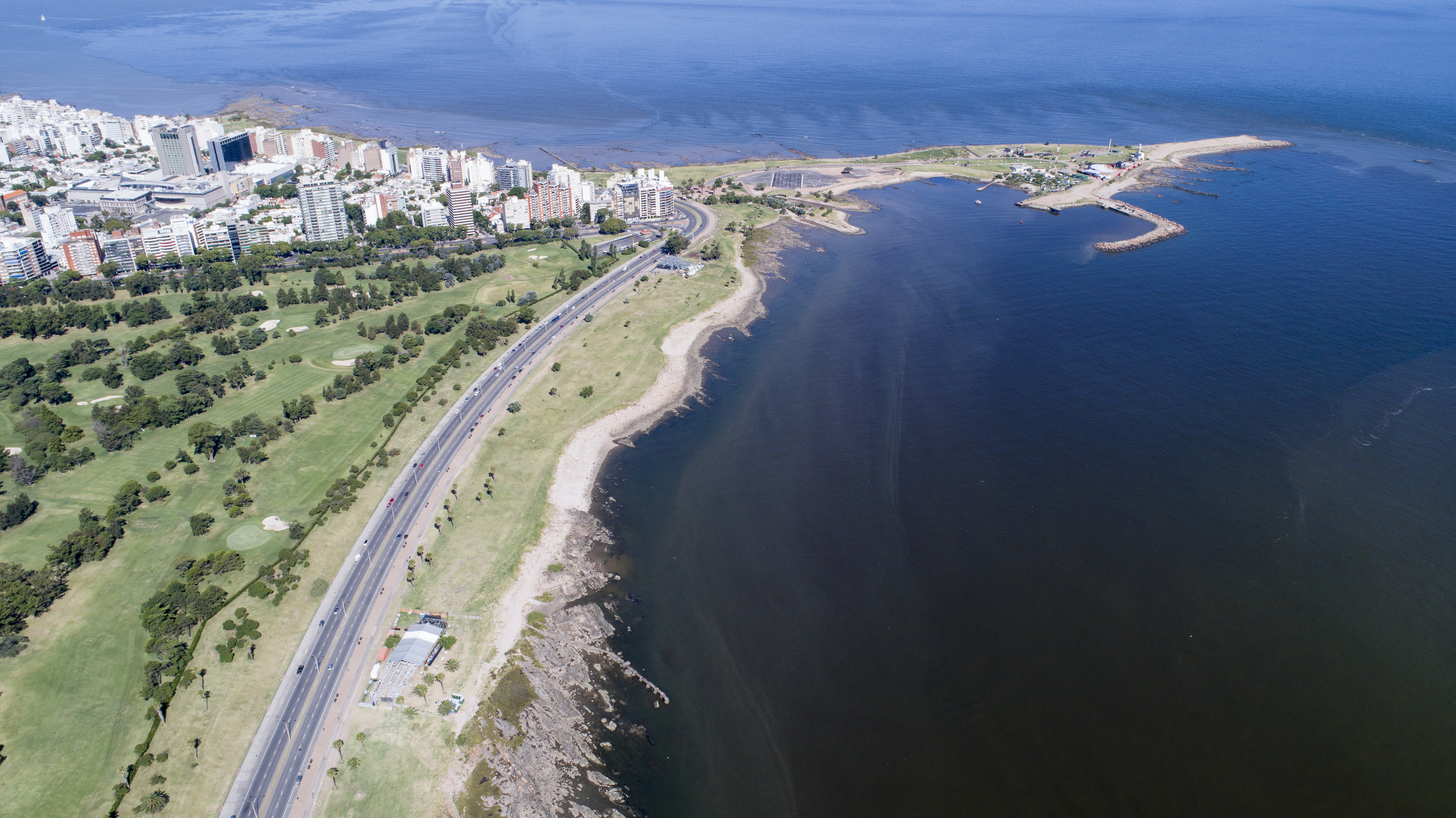 Parte del Club de Golf, su llegada a la Rambla y Bulevar Artigas